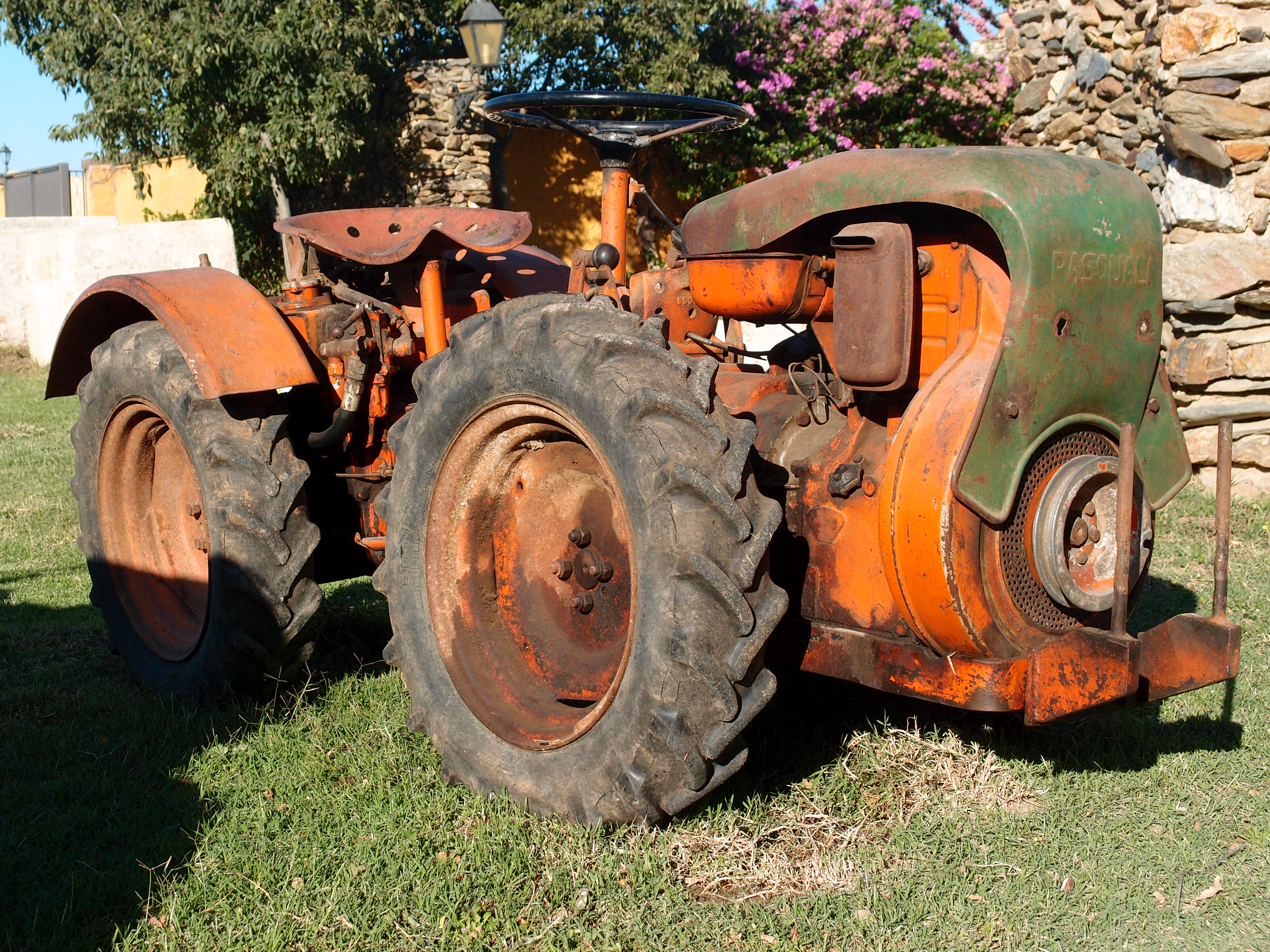 Pasquali Oldtimer-Traktor auf dem Weingut Coll de Roses (Roses/Katalonien/Spanien) Datum: 15.09.2012 Urheber: M. Pfeiffer alias Benutzer:Gordito1869 Quelle: privates Fotoarchiv des Urhebers